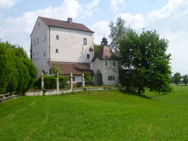 Schloss_Forstern_heute